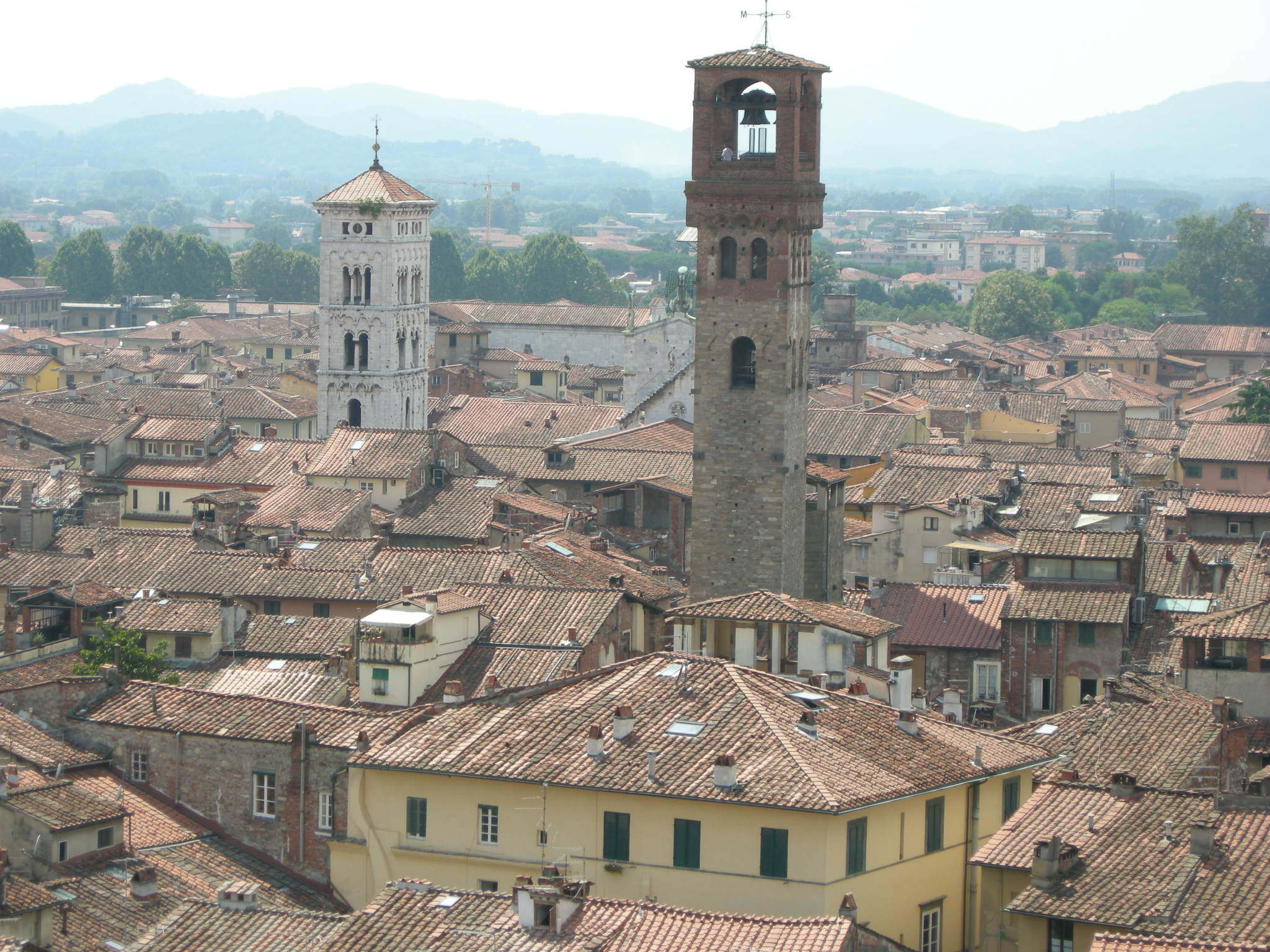 Torre guinigi, view 06 torre dell'orologio e chiesa di san michele